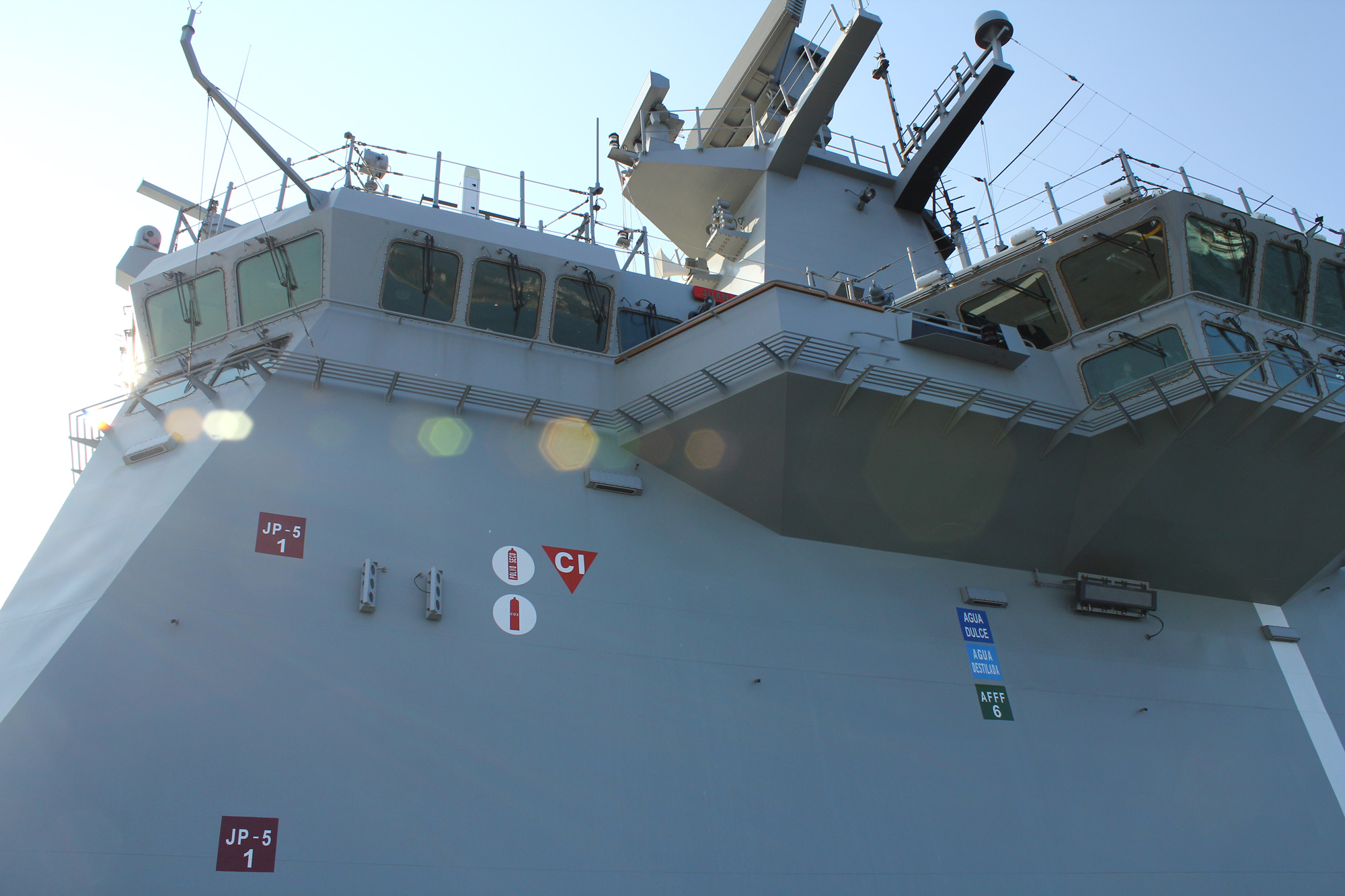 Buque de Proyección Estratégica "Juan Carlos I" de la Armada Española, amarrado en el muelle de transatlánticos de Vigo. Este barco es una mezcla de portaaviones y buque de desembarco: puede lanzar aviones, helicópteros y lanchas con tanques, blindados y todo tipo de vehículos desde un muelle inundable situado en la popa. The L-61 "Juan Carlos I" in Vigo Strategic Projection Ship "Juan Carlos I" of the Spanish Navy, moored at the liners dock in Vigo. This boat is a mix of aircraft carrier and landing ship, it can launch planes, helicopters and boats with tanks, armored vehicles and all kind of vehicles from a flooded dock located at the stern.